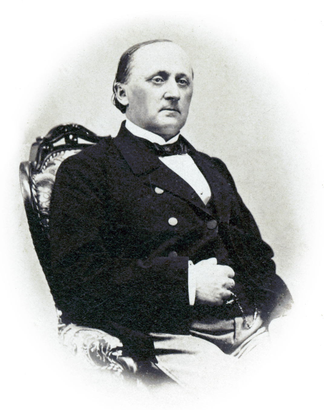 Olof Strandberg, sångare vid Kungliga Operan 1861